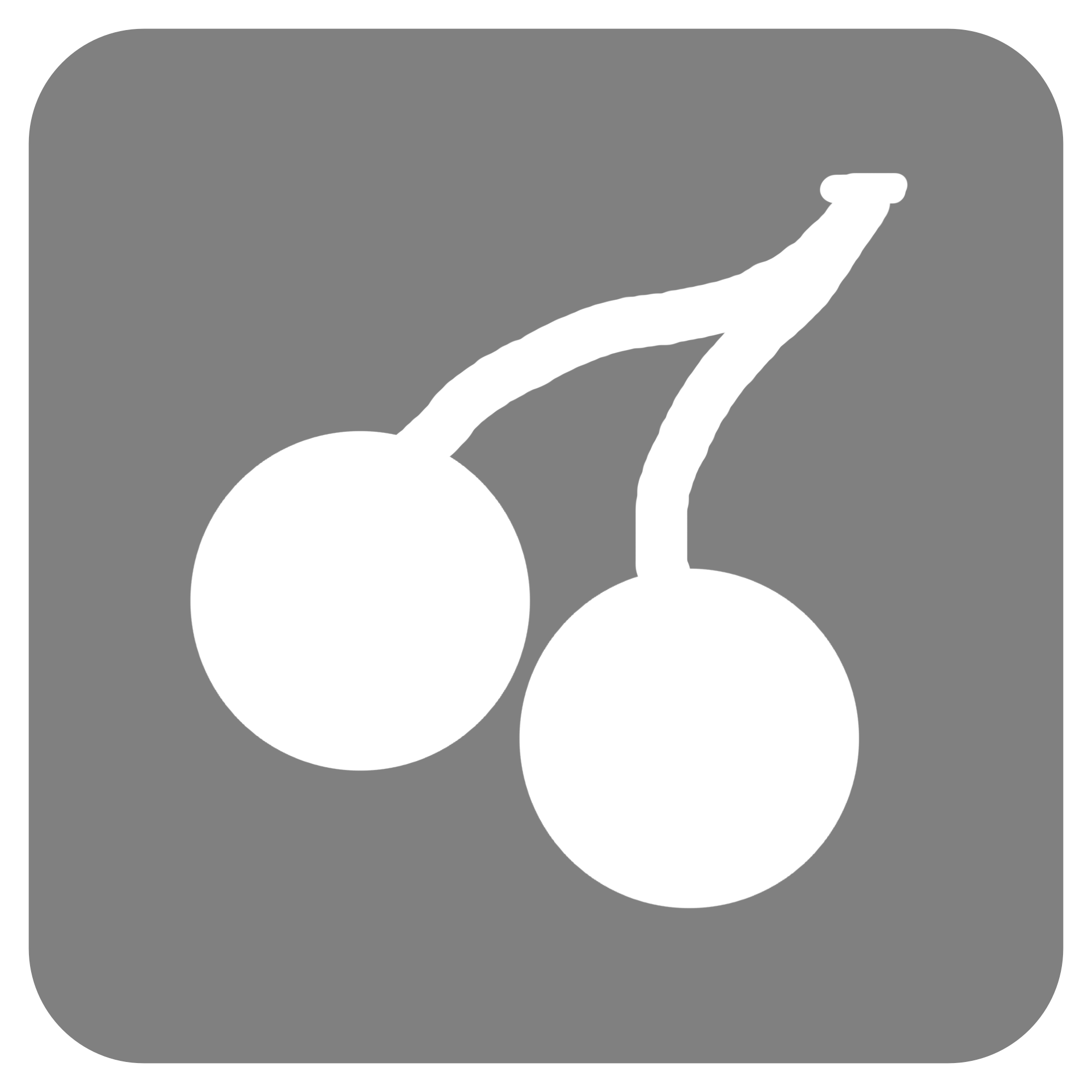 Símbolo utilizado para identificar a la estación Los Guindos (actual Buin Zoo) en 2001.